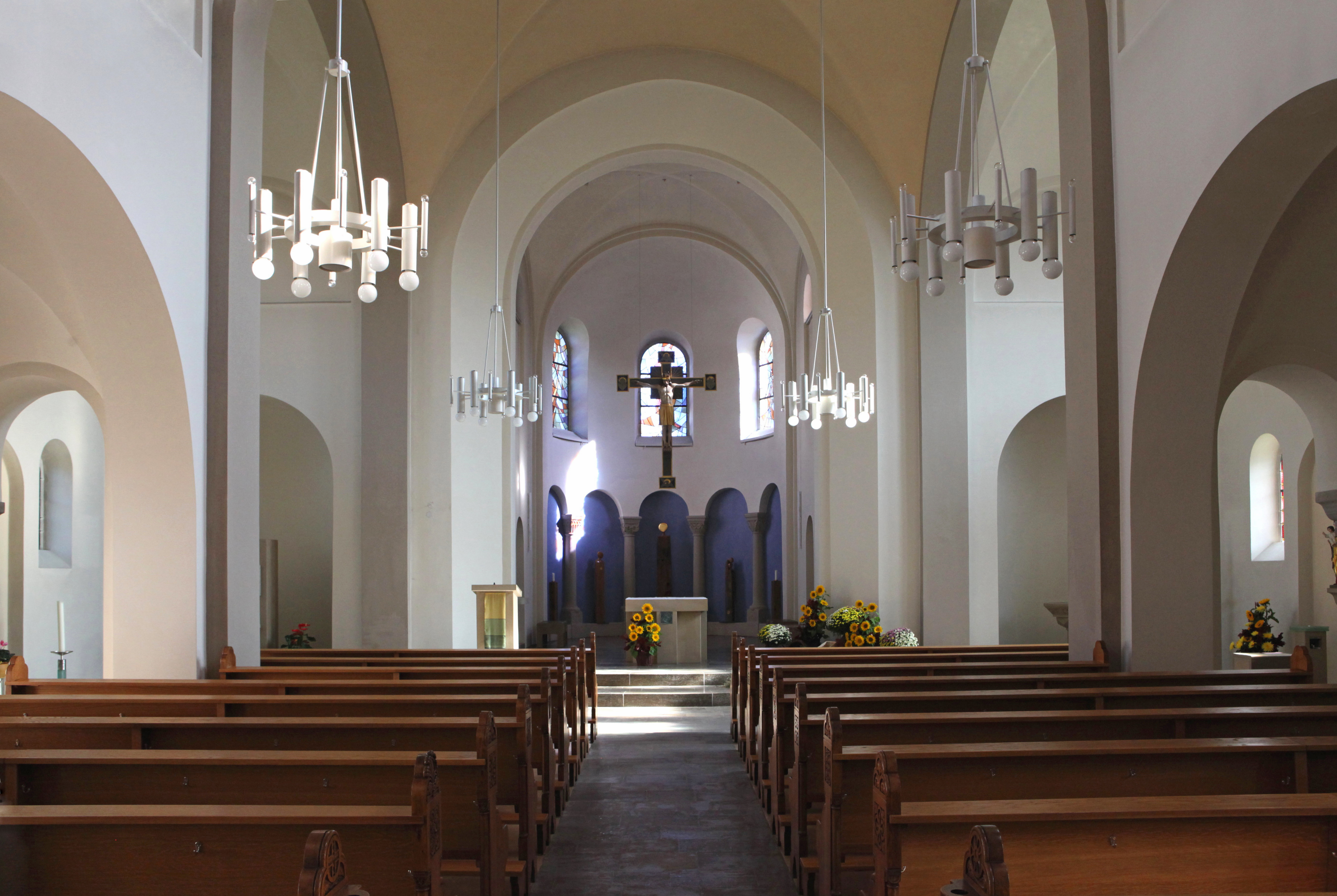 Sonneberg St. Stefan